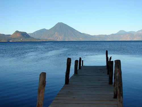 FOTOGRAFIA PANAJACHEL